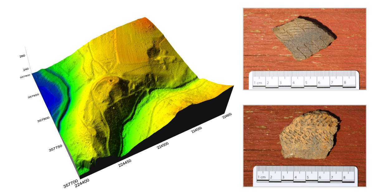 Numeryczny Model Terenu grodziska w Zawidowie oraz wczesnośredniowieczna ceramika odkryta w trakcie badań czasopisma Archeologia Żywa